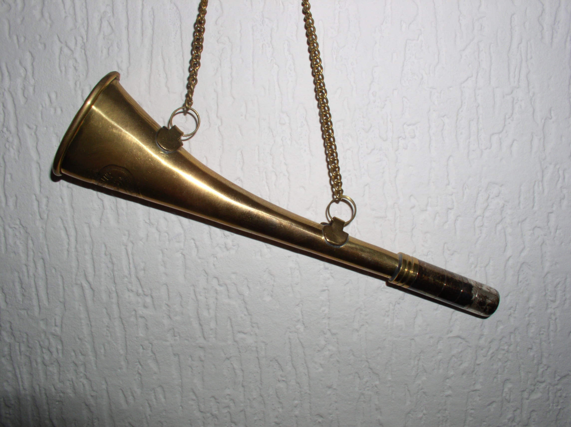 Tröte! Nebelhorn für kleinere Schiffe